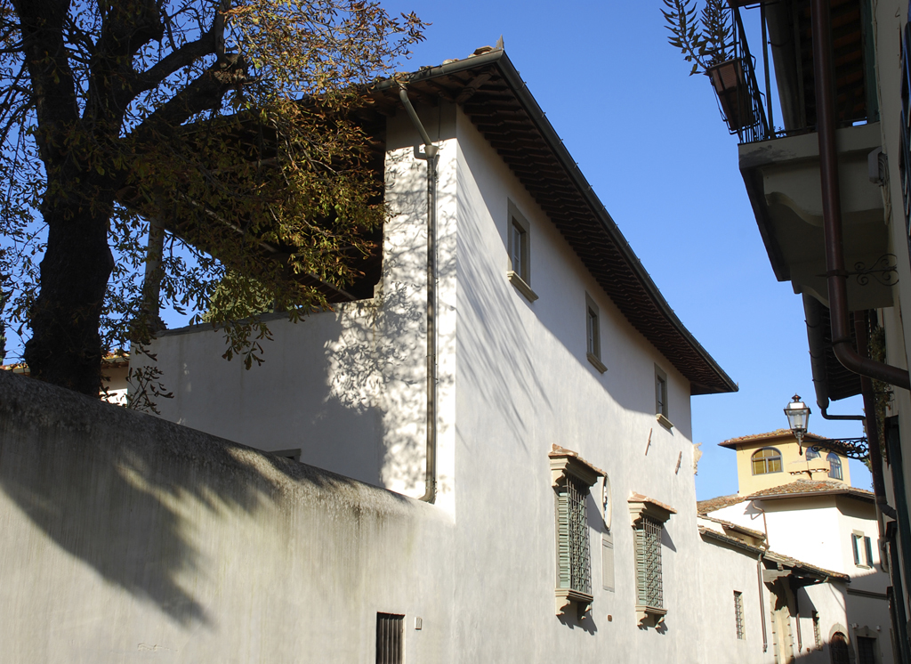 Villa Il Gioiello (the last home of Galileo Galilei), Florence, Italy. Facade. A view from Via Pian dei Giullari.